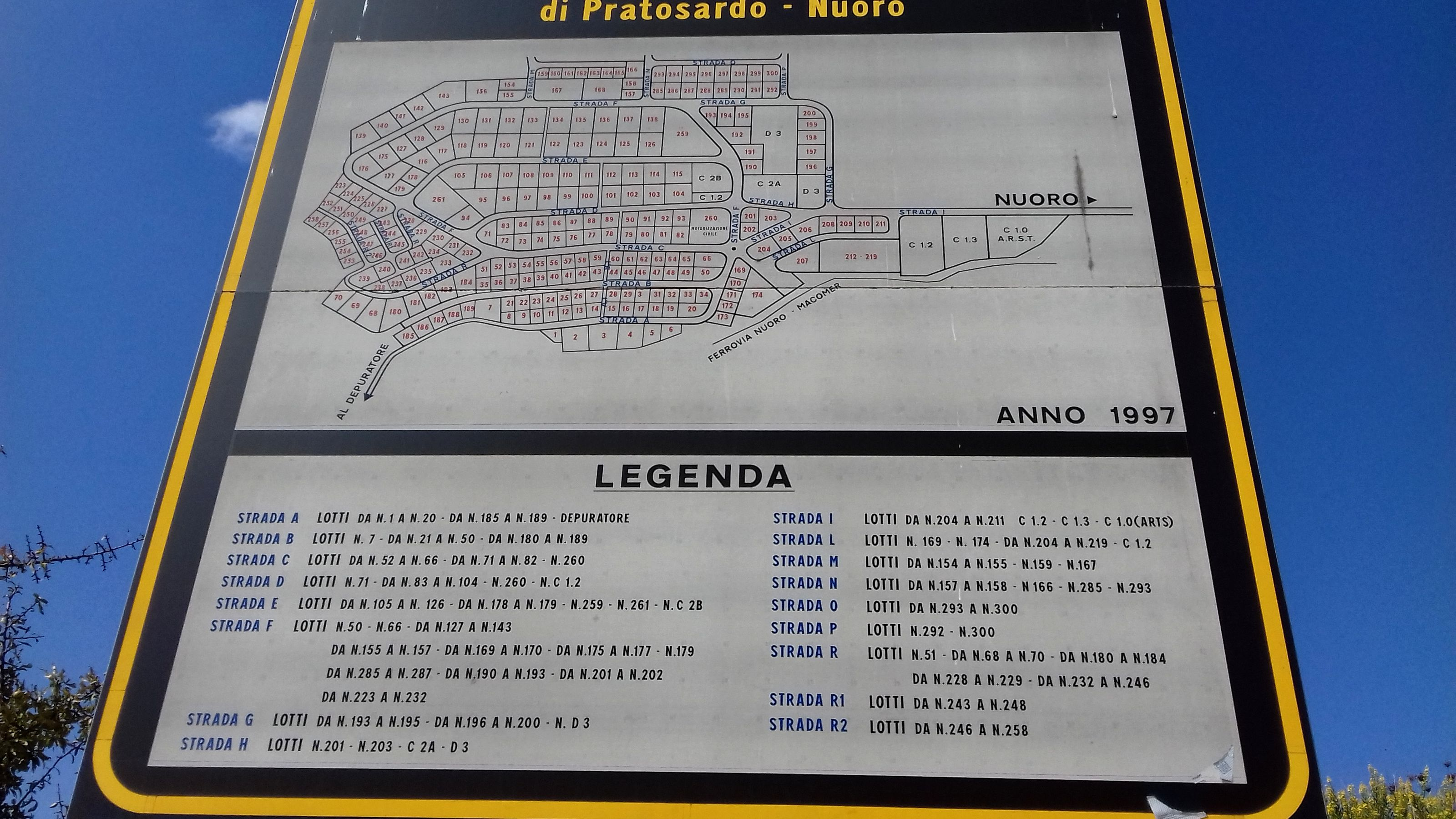 Cartello stradale con l'indicazione dei lotti e delle strade della Zona Industriale di Pratosardo (frazione del Comune di Nuoro).